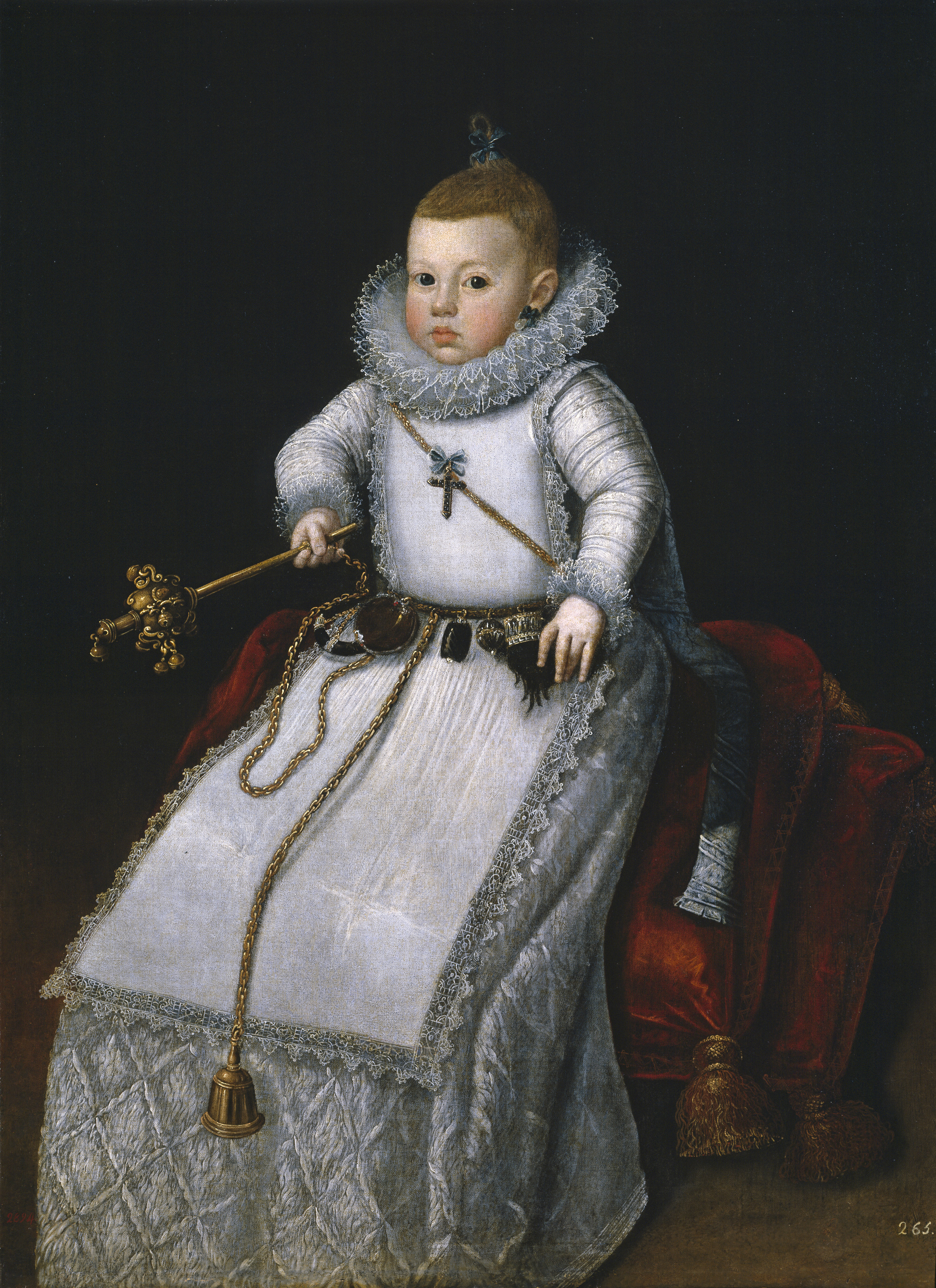 Retrato de la infanta Margarita Francisca (1610-1616), hija de Felipe III